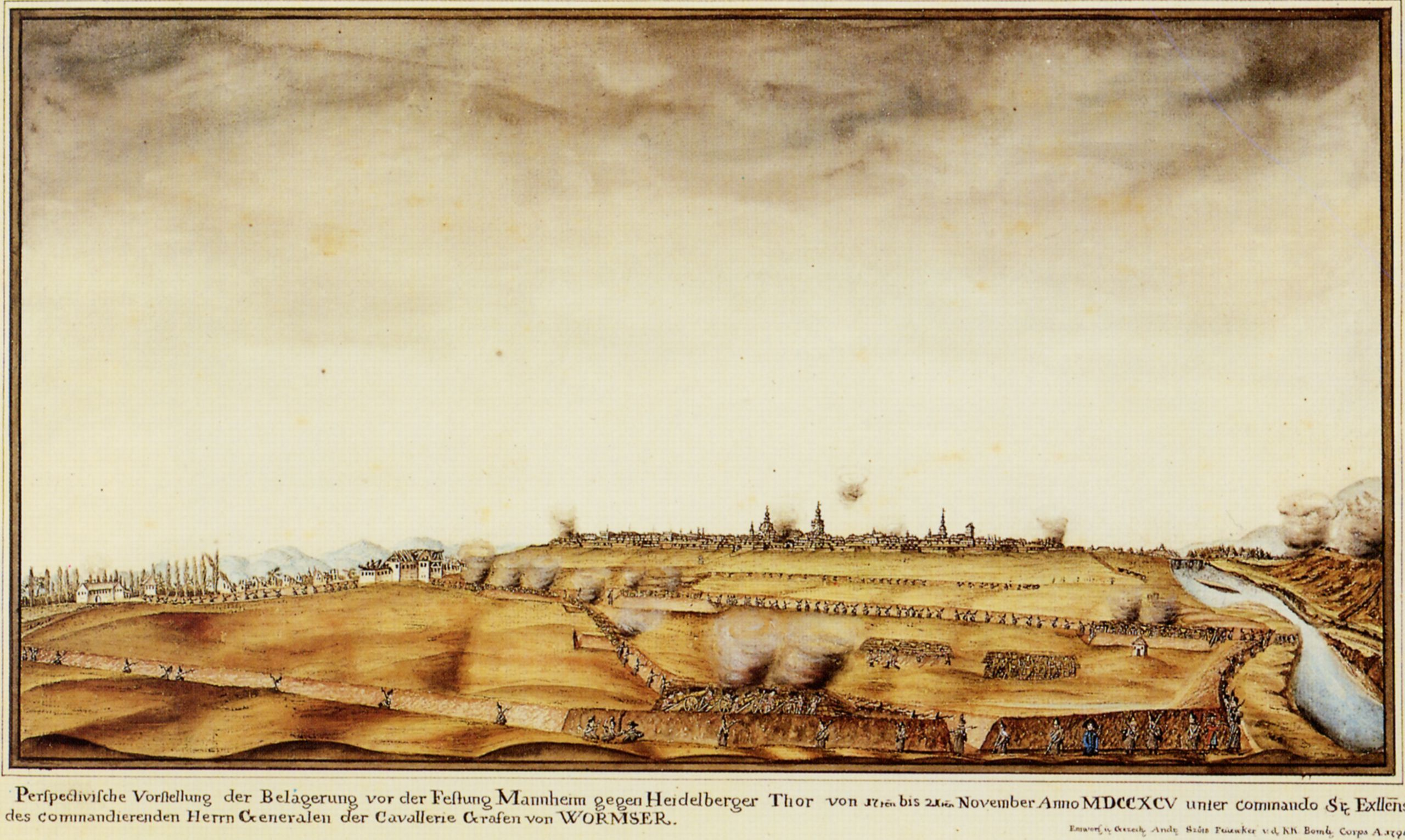 Andreas Szöts: Illustration der Belagerung der französisch besetzten Stadt durch den k.u.k. General Dagobert von Wurmser im November 1795. 36,5 × 53,3 cm. Reiss-Engelhorn-Museen, Mannheim.